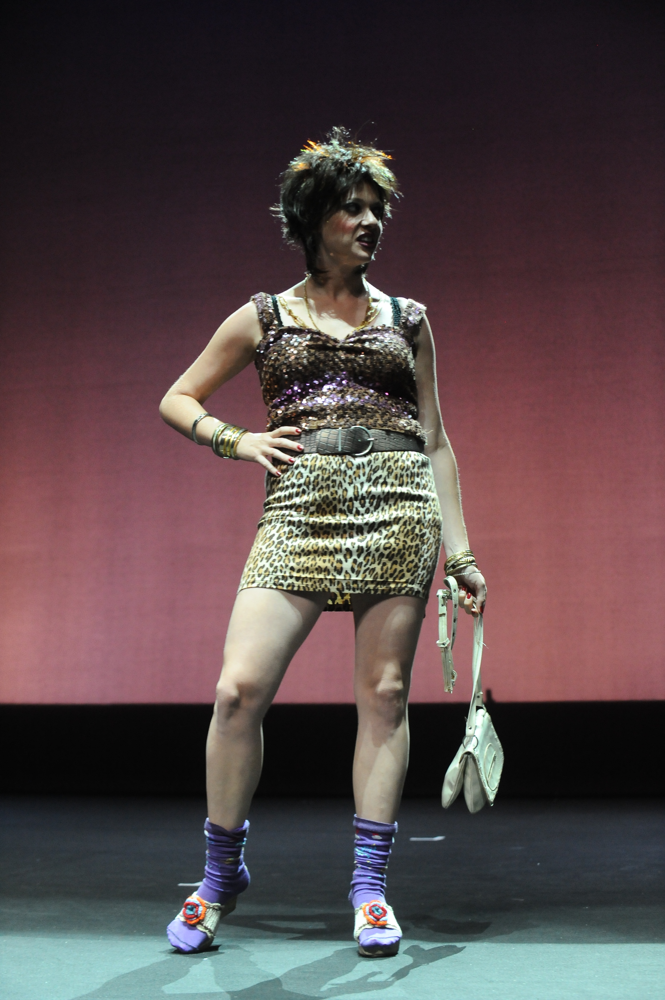 שירי גדני בהצגה אורזי מזוודות